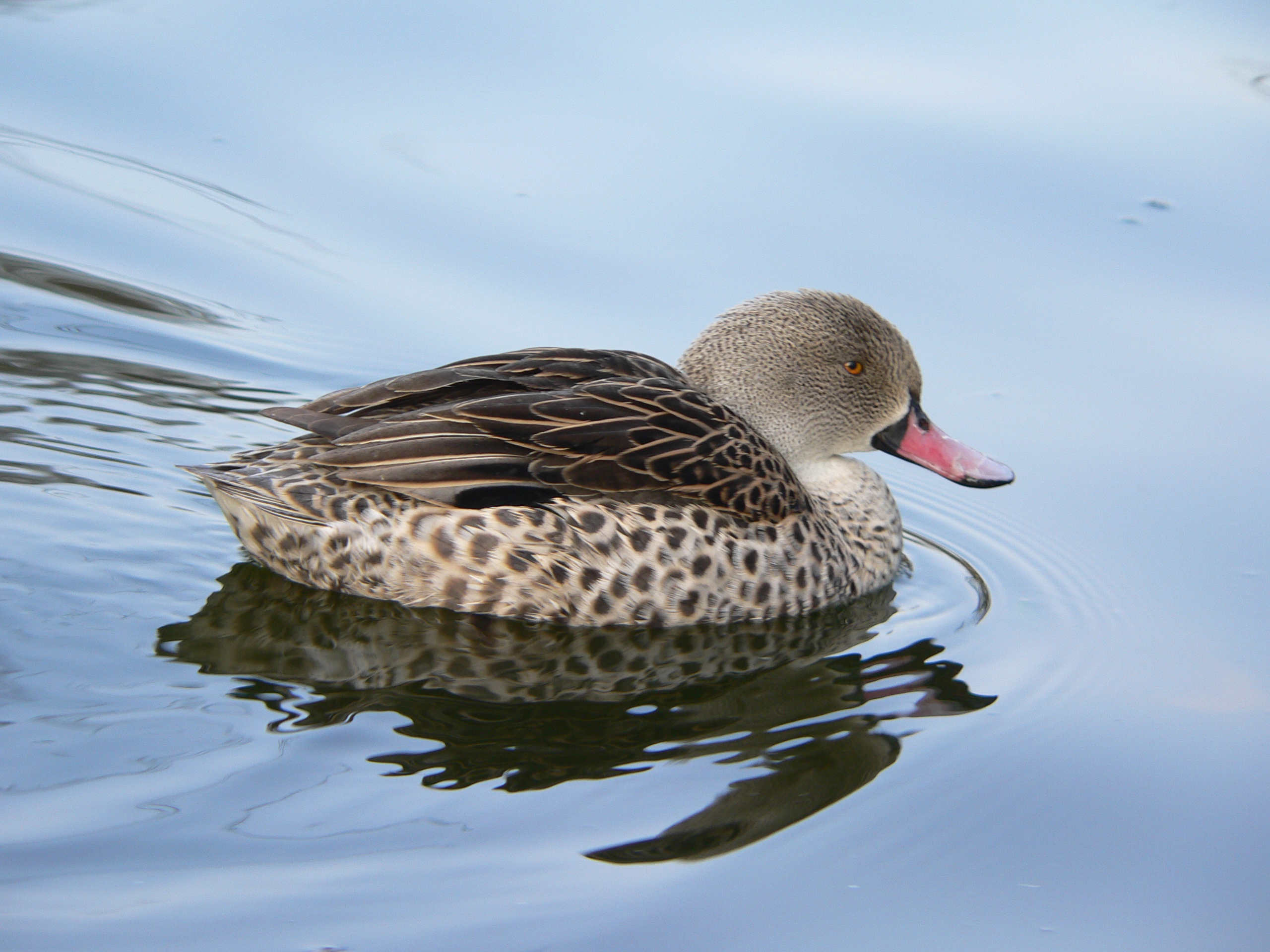 Anas capensis